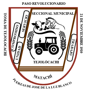 Escudo seccional de Tejolocachi, municipio de Matachi, chihuahua. en el se ilustran as cabezas de un caballo y una vaquilla, un tractor y dos espigas emblemas de las principales actividades que se realizan en el seccional de Tejolocachi que comprende a las comunidades de Rancho Blanco, Chihuahuita, La Estacion, San Jose de Nava, San Rafael de las Manzanas y la cabecera seccional de Tejolocachi que comprende de 700 a 800 habitantes.